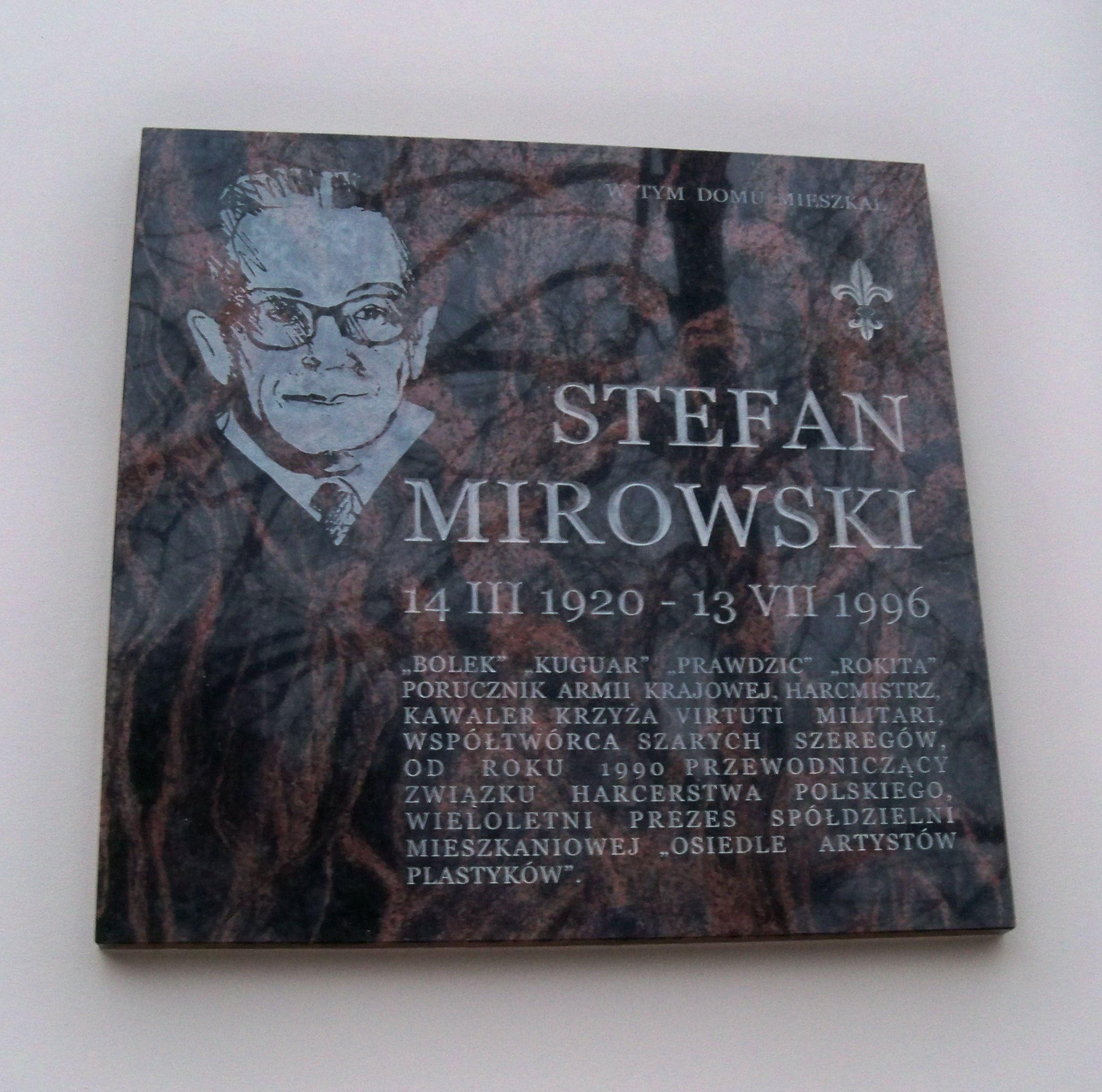 Granitowa tablica na domu przy ul. Fitlrowej 83 (róg Akademickiej) w Warszawie: W tym domu mieszkał Stefan Mirowski 14 III 1920 – 13 VIII 1996 - „Bolek” „Kuguar” „Prawdzic” „Rokita” porucznik Armii Krajowej, harcmistrz, Kawaler Krzyża Virtuti Militari, współtwórca Szarych Szeregów, od roku 1990 Przewodniczący Związku Harcerstwa polskiego, wieloletni Prezes Spółdzielni Mieszkaniowej „Osiedle Artystów Plastyków”.